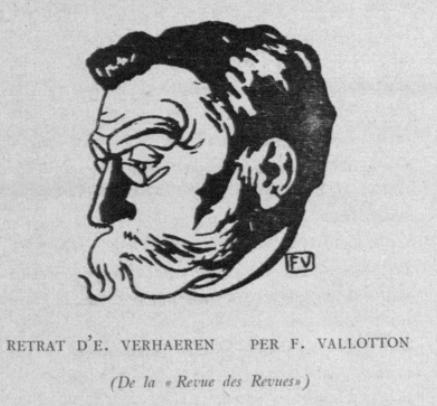 Retrat de Verhaeren publicat a la revista Catalonia.